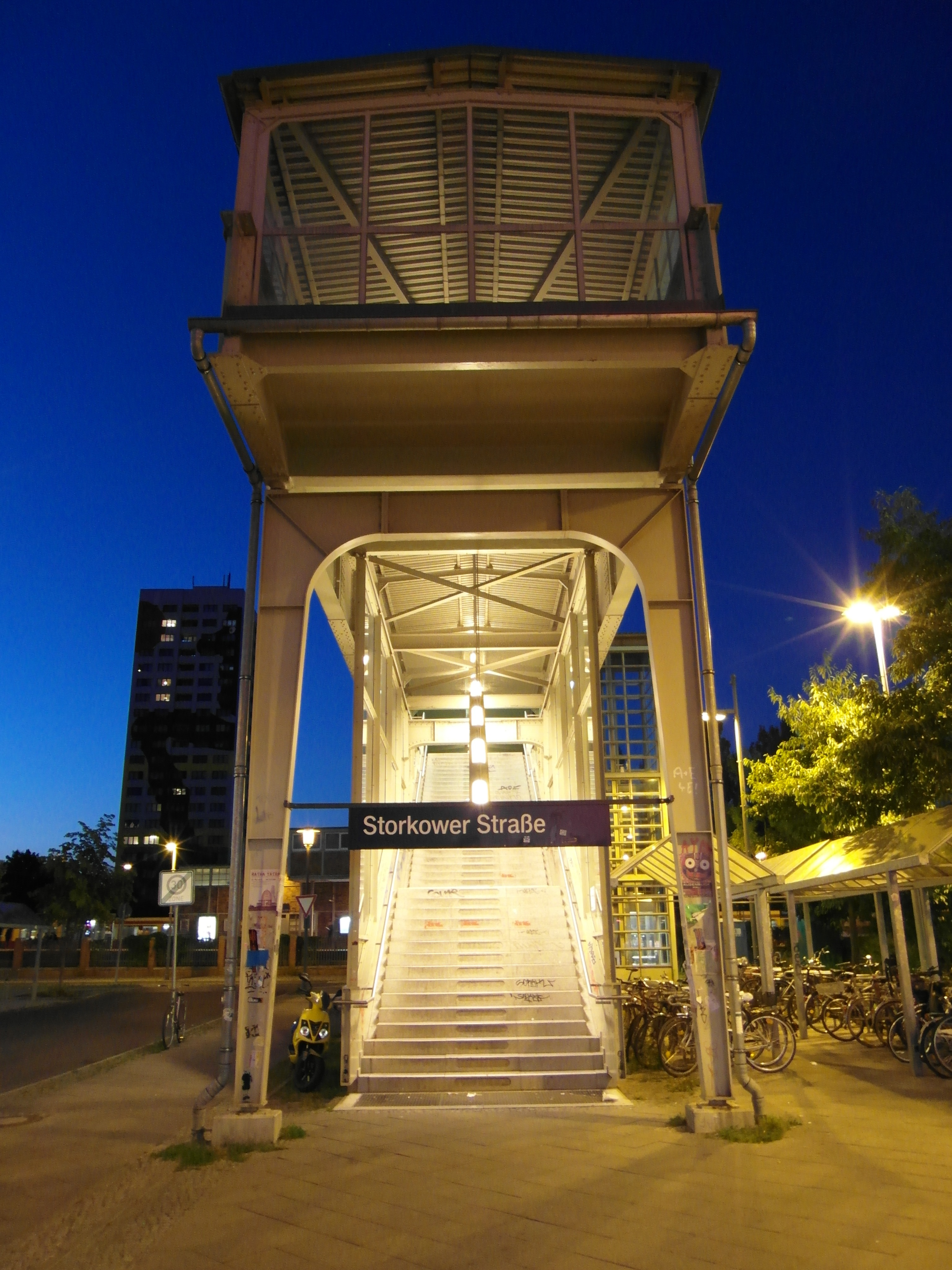 Ringbahn - Linien S41, S42, S8 - zur Zeit auch S9 und vielleicht auch mal wieder S85